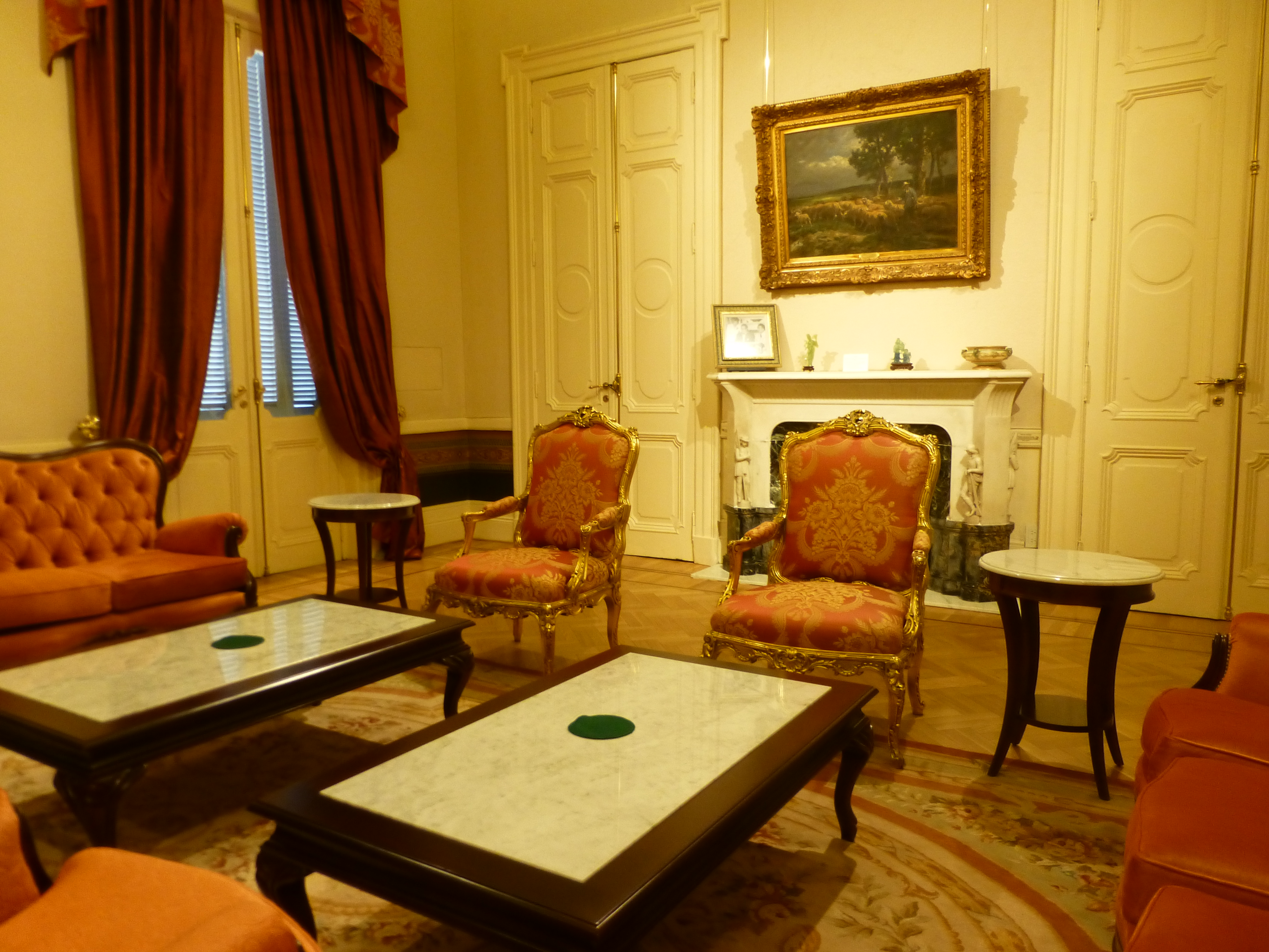 Casa de Gobierno